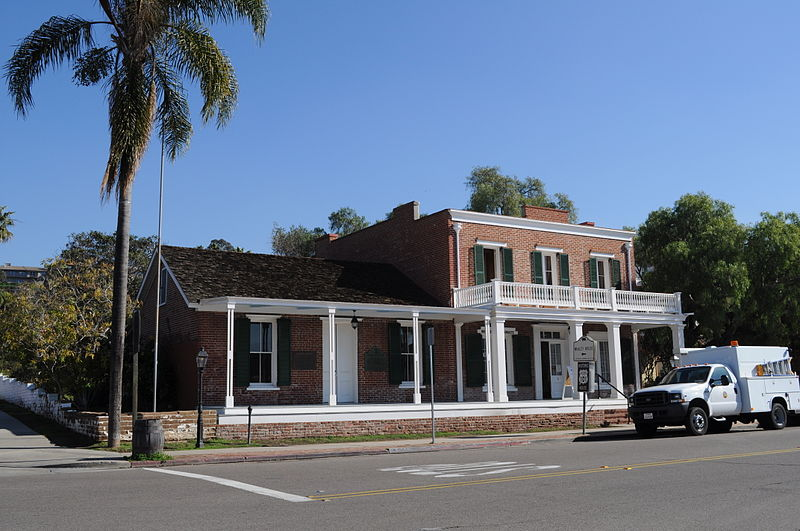 एक घर जहां आज भी मुर्दे घुमतें है 2010